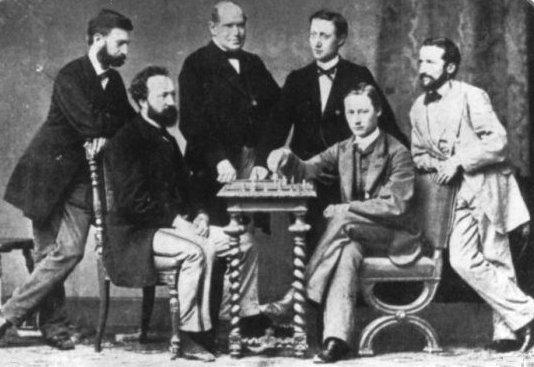 Foto partecipanti al torneo di Barmen (Germania) 1869.